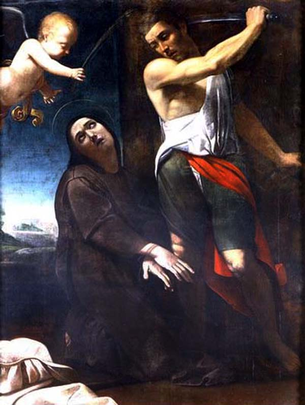 Martyrium der Hl. Eugenia von Rom (Gemälde von Sementi)